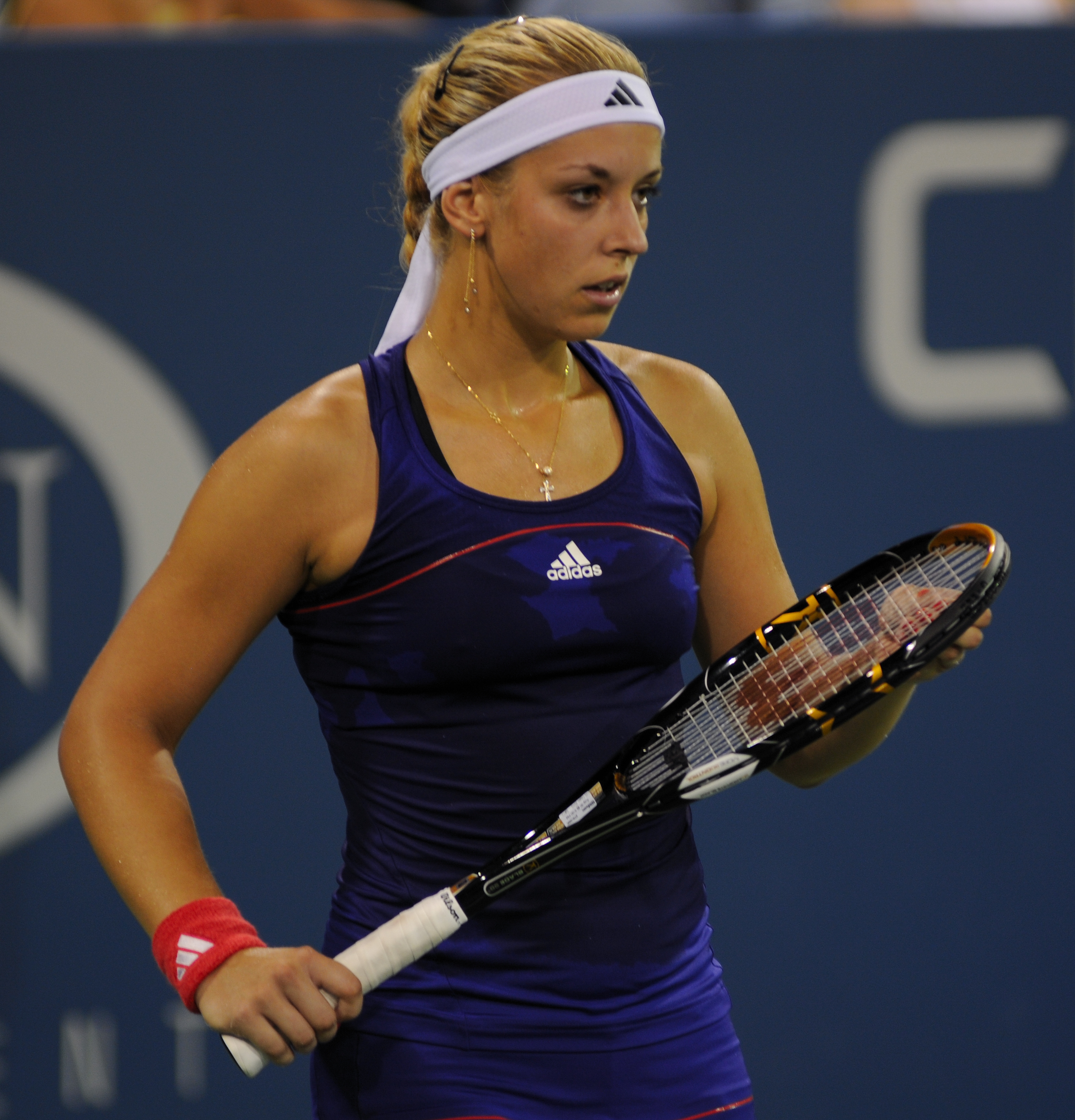 Sabine Lisicki - US Open 2010